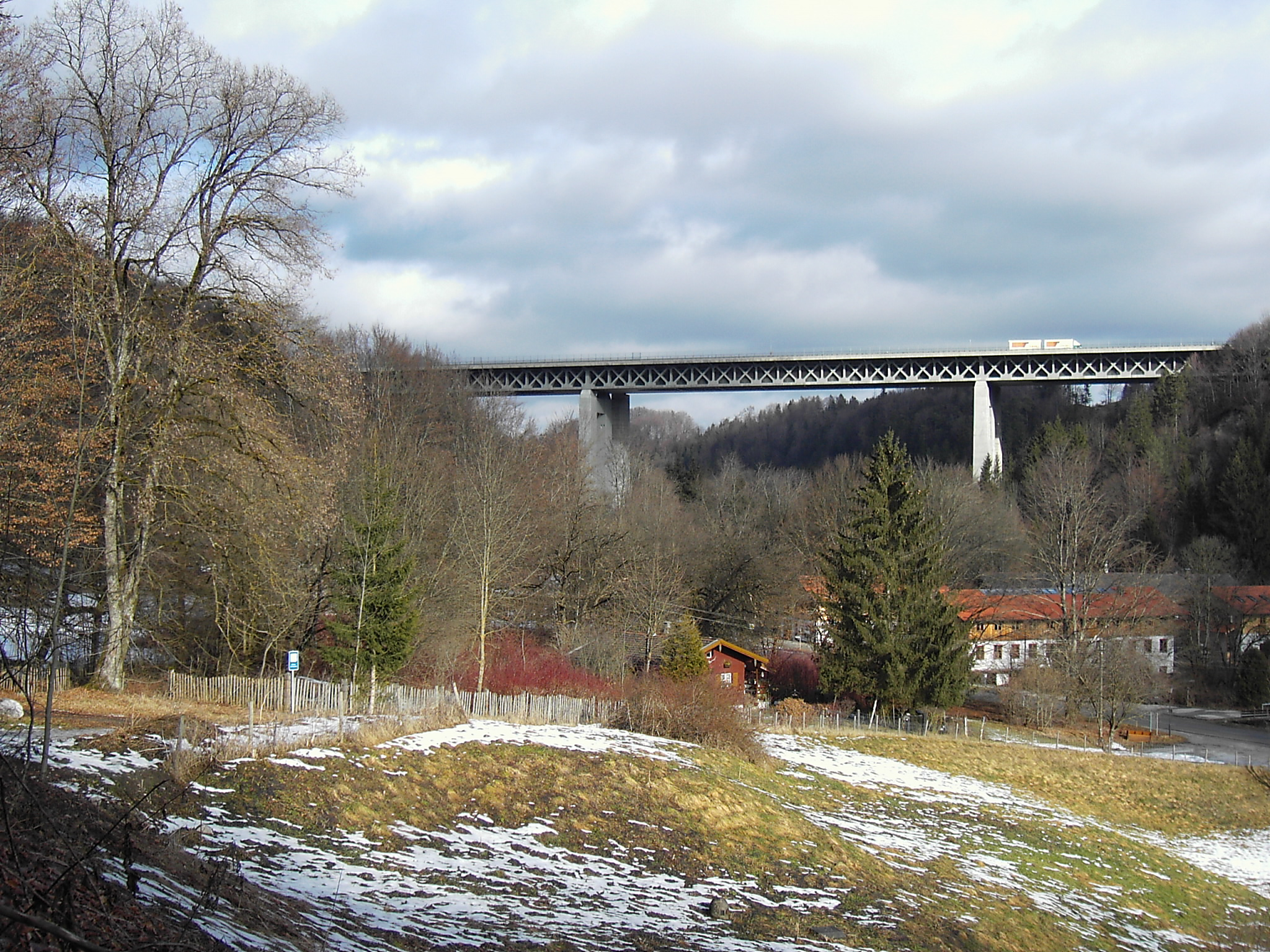 Mangfallbrücke der Autobahn A 8 im Landkreis Miesbach, Bayern